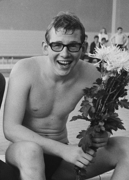 Ton van Klooster